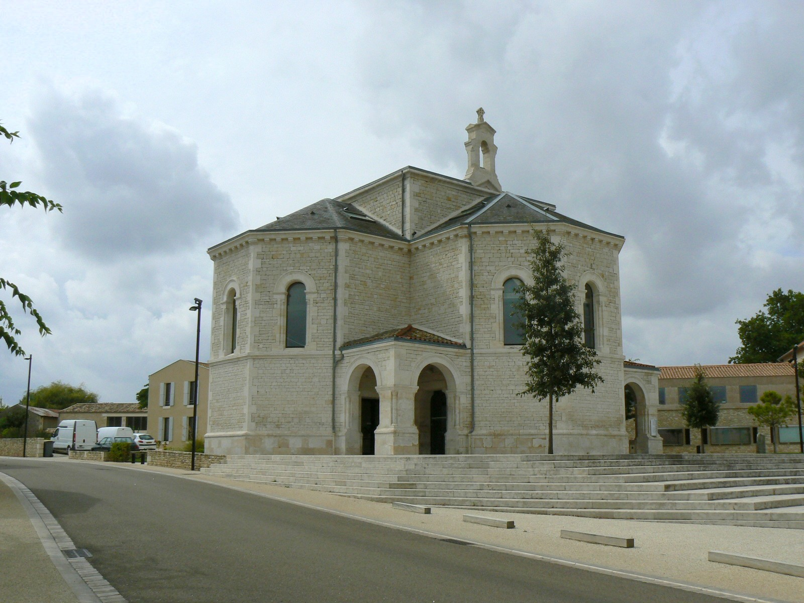 Temple protestant de Chauray, (Inscrit, 1988) .